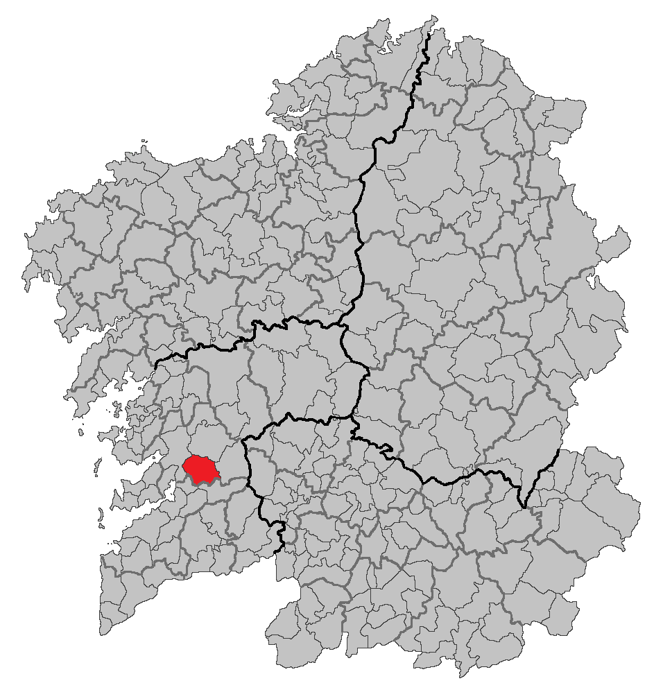 Mapa coa localización do concello de Ponte-Caldelas.